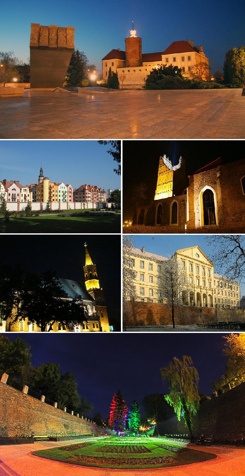 Ratusz Starego Miasta, Zamek Książąt Głogowskich, Kolegiata NMP, Stare Miasto, Pomnik Dzieci Głogowskich, Most Tolerancji